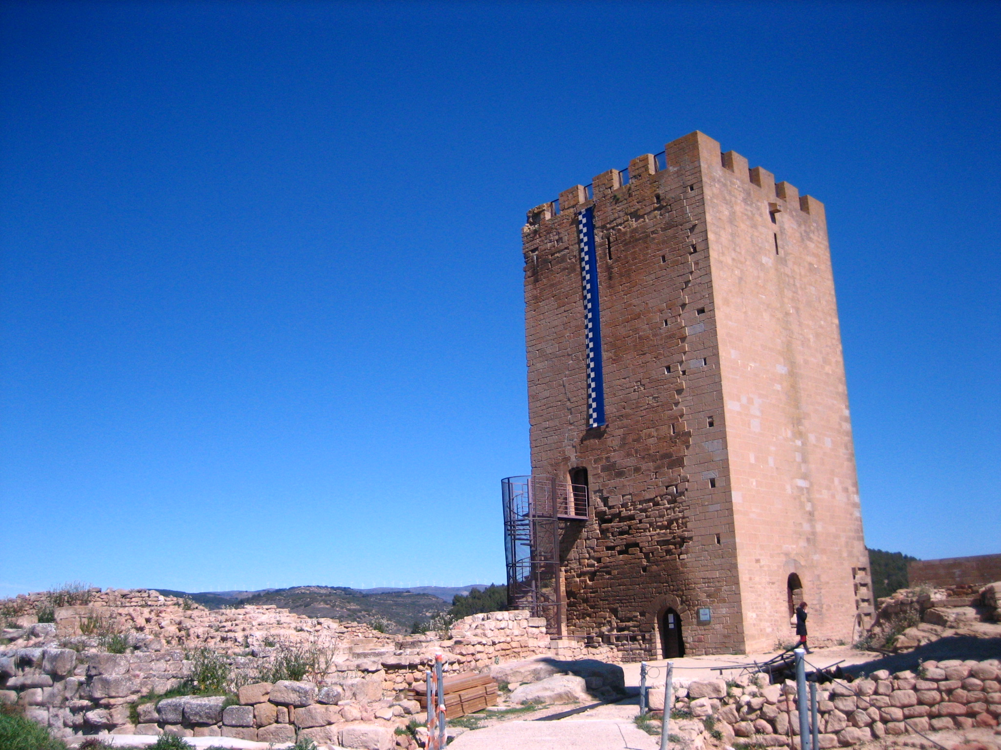 Torre del castillo